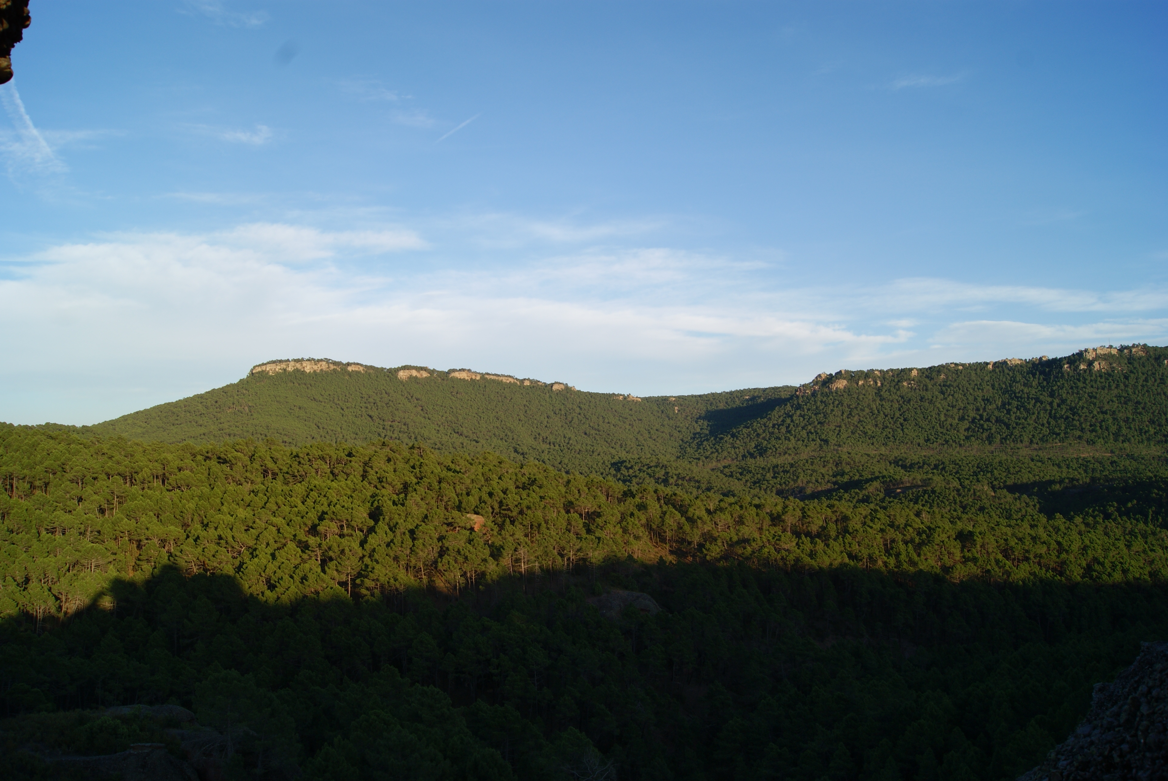 VISTA DEL PICO DEL TELEGRAFO